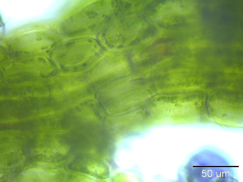 Kriechendes Schuppenzweig-Lebermoos (Lepidozia reptans), 3-lappige Zellen, Vergr: 400x, Rostock